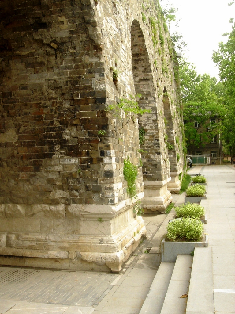 南京东华门